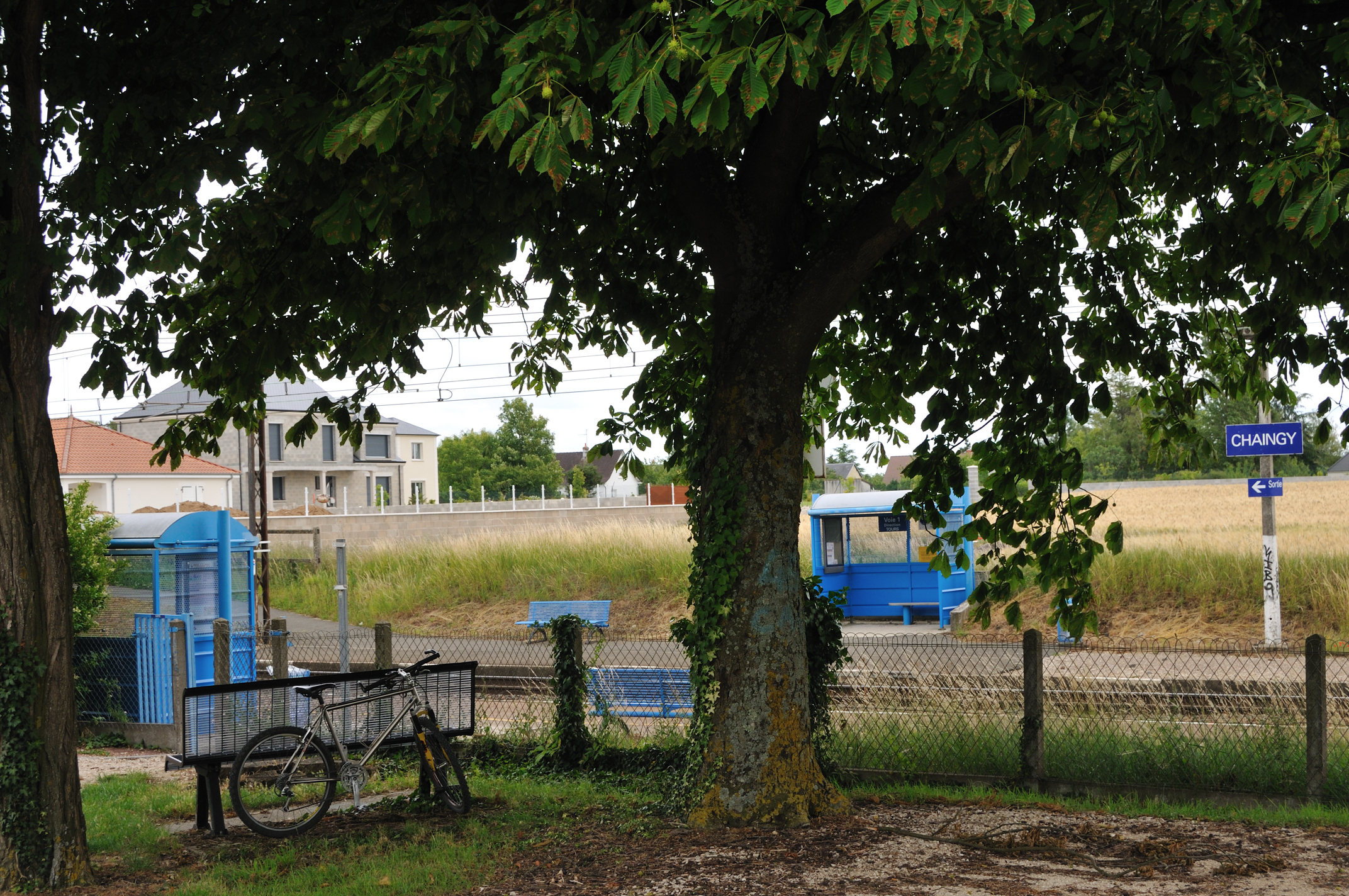 Gare de Chaingy-Fourneaux-Plage, Loiret, France